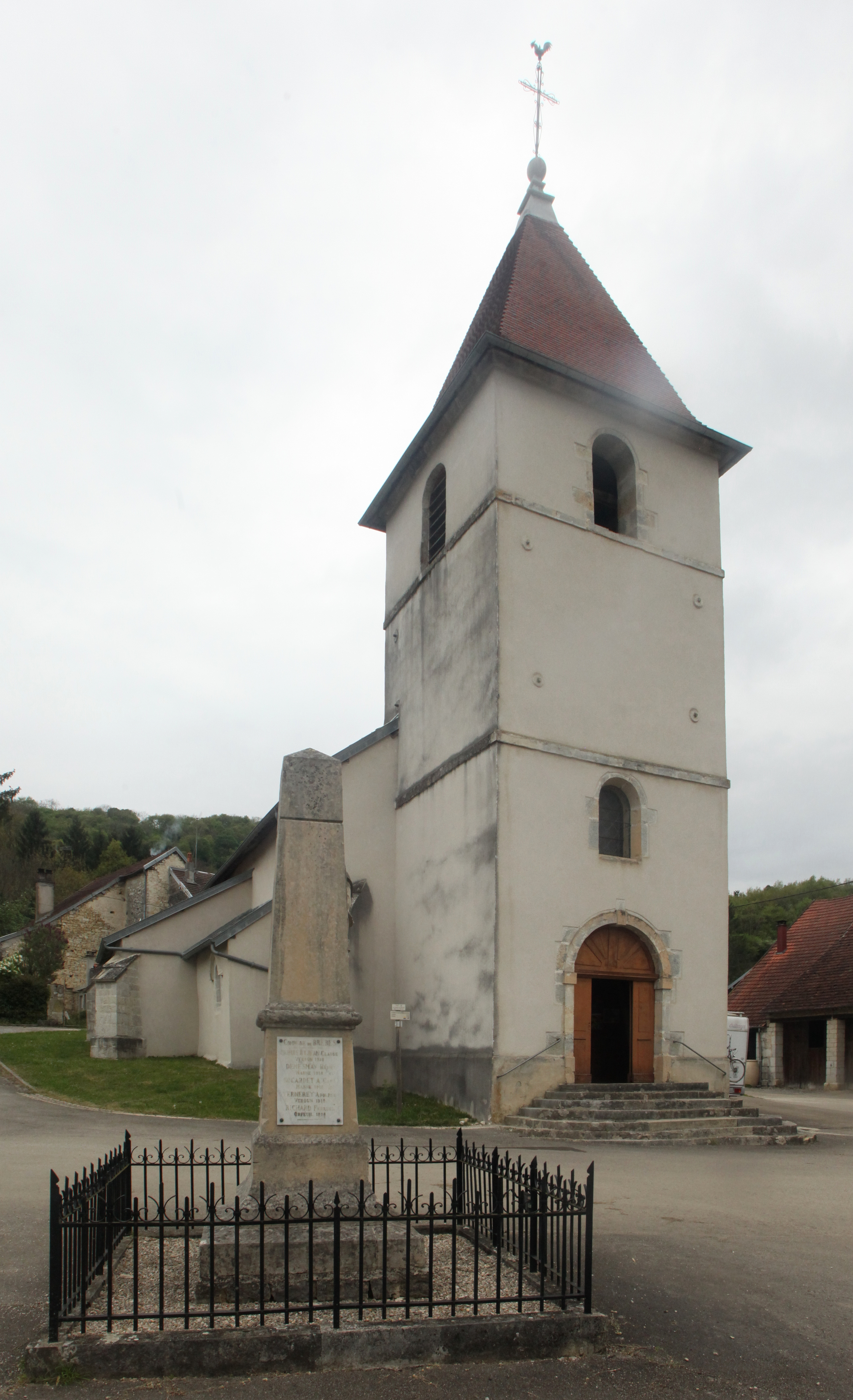 Église de Mesmay (Doubs).